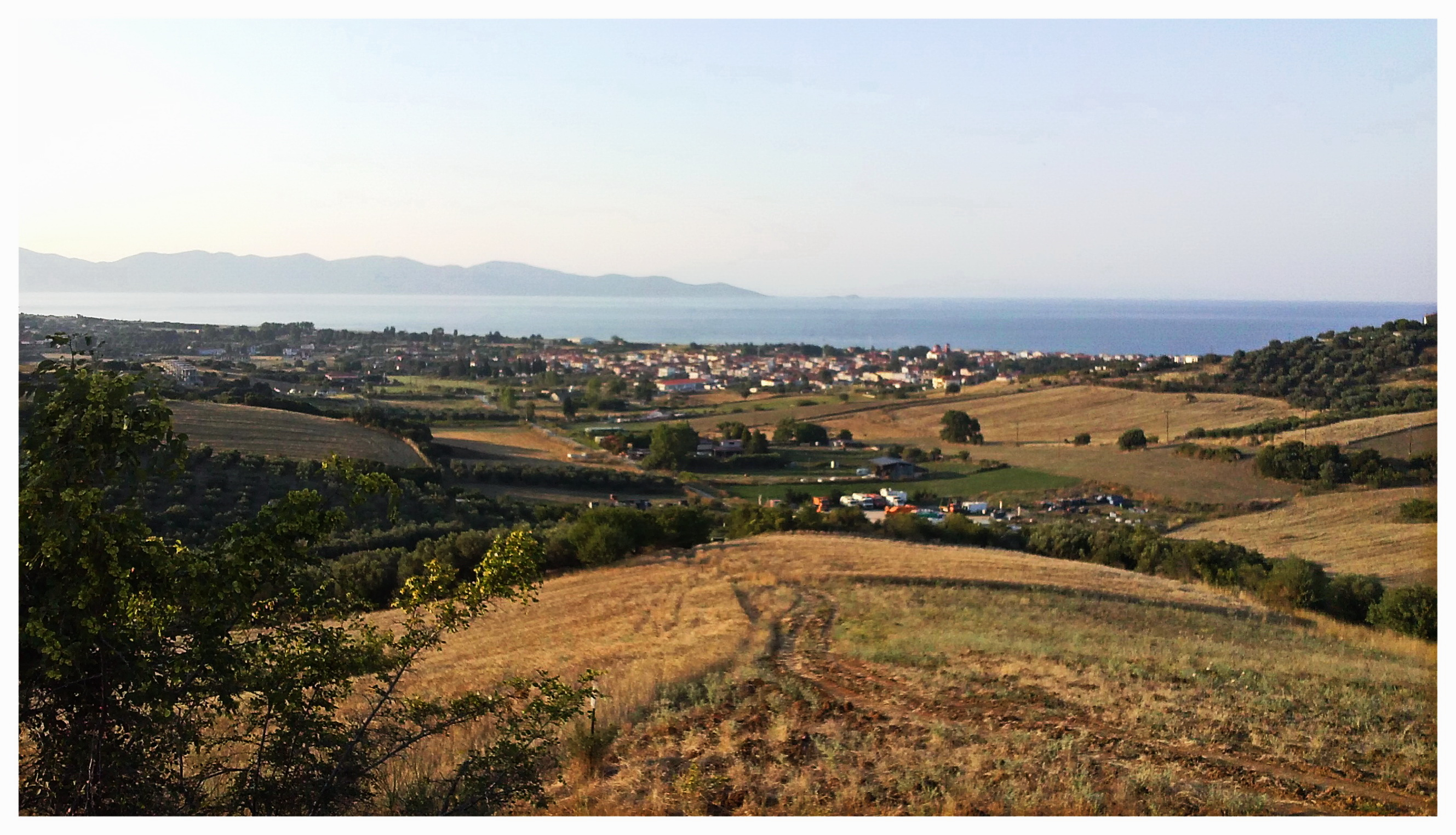 Јерисос